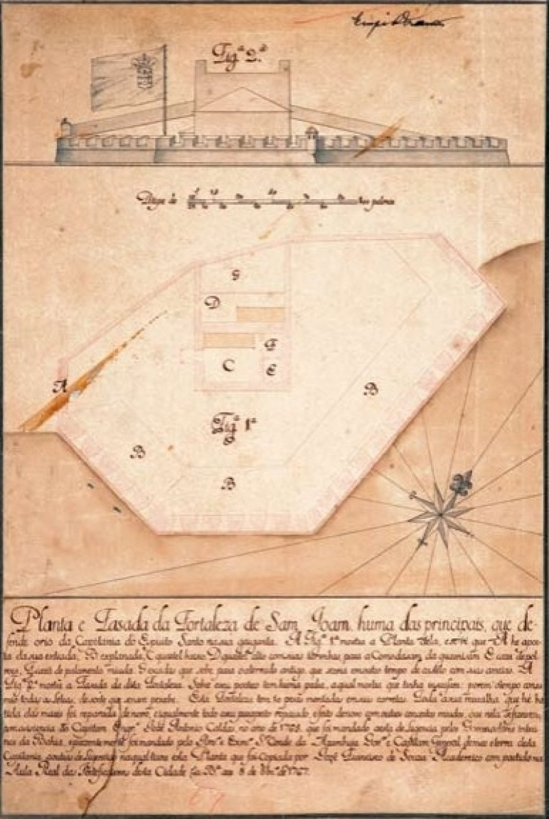 Planta da construção do Forte São João da cidade de Vitória.